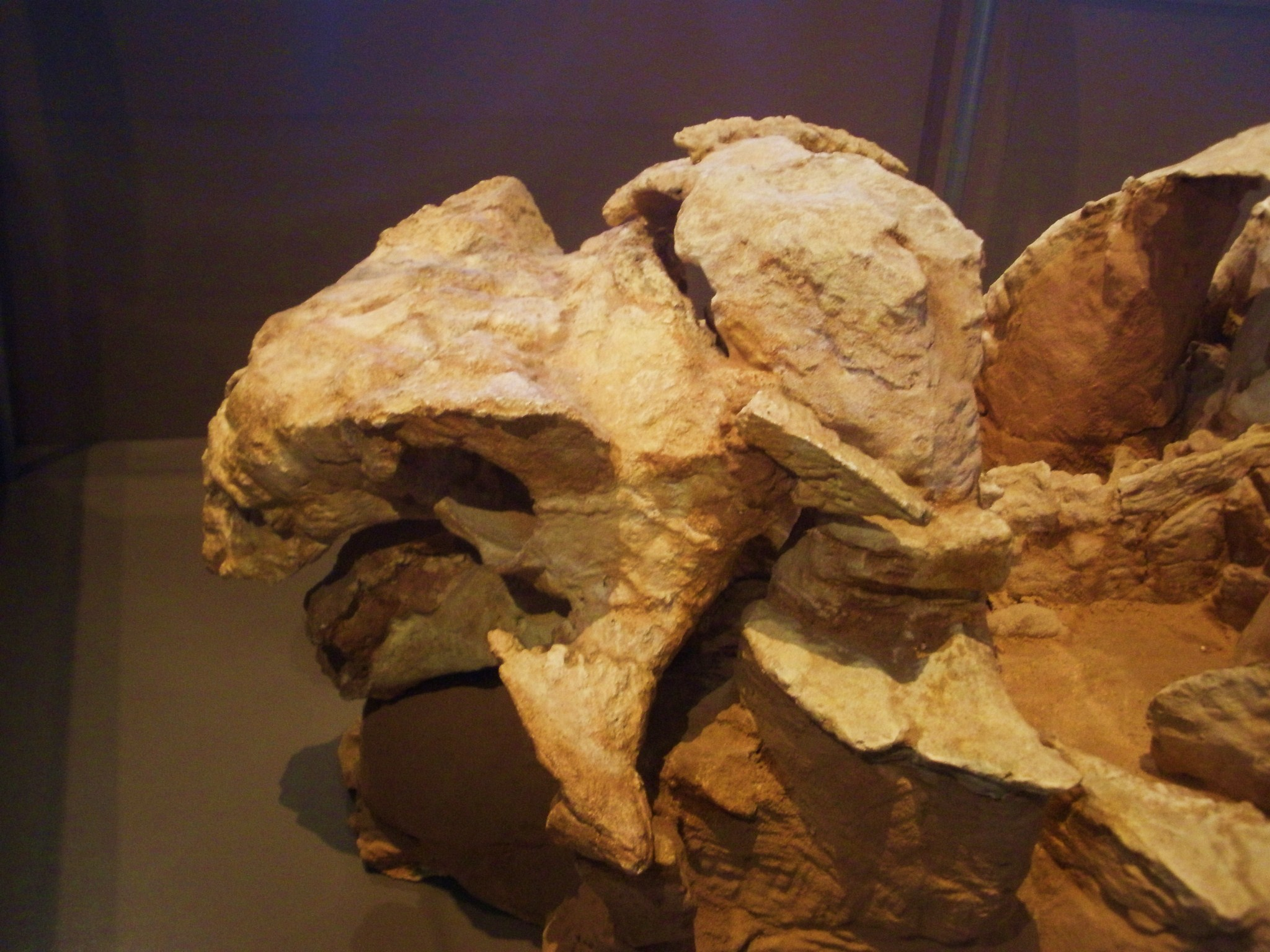 Fossil of Pinacosaurus, an ankylosaurid dinosaur Took the photo at Musee d'Histoire Naturelle, Brussels